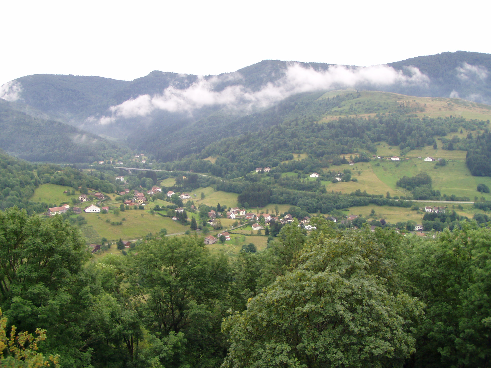 vue de Bussang-les-Sources depuis les Balcons de Bussang